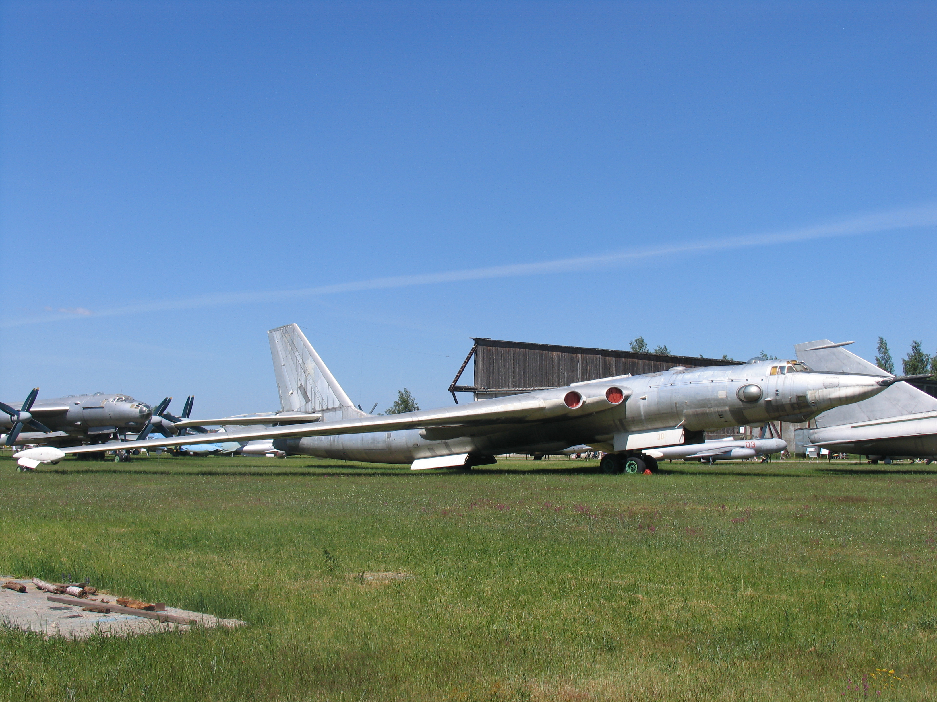 Стратегический бомбардировщик 3МД в музее ВВС.